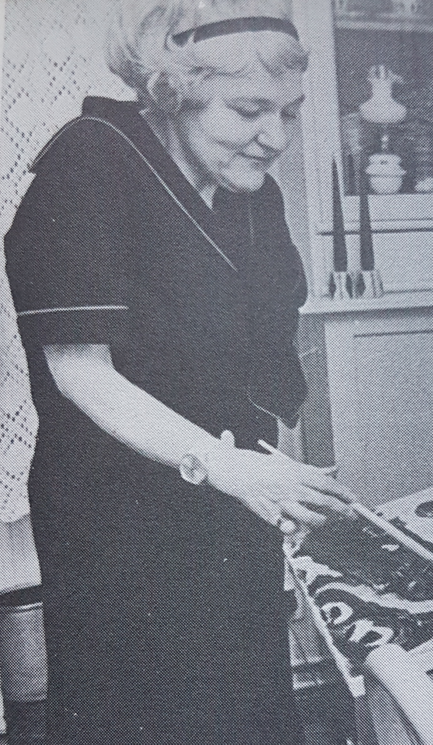 Svea Jansson Artist.from Sweden